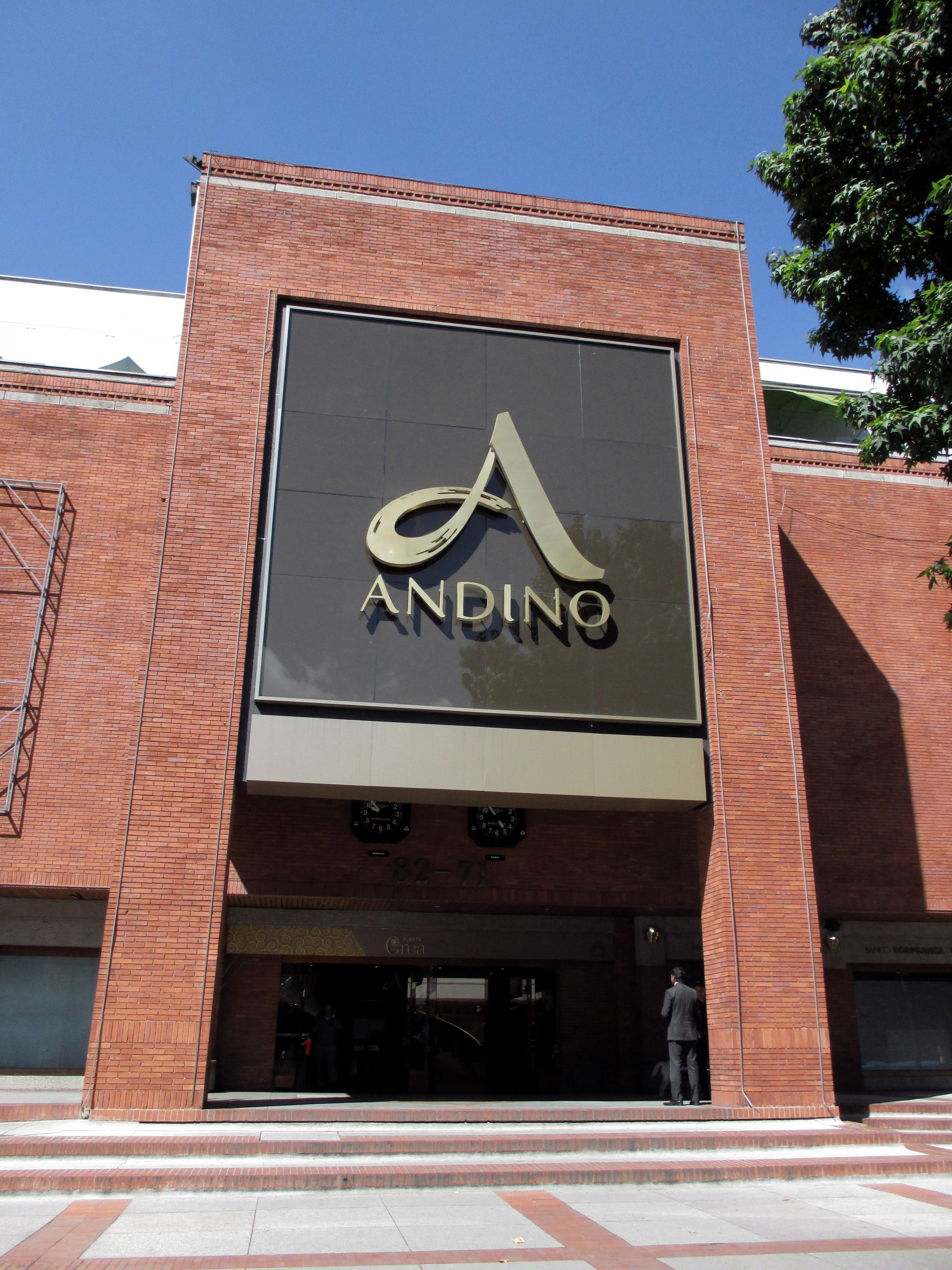 Bogotá